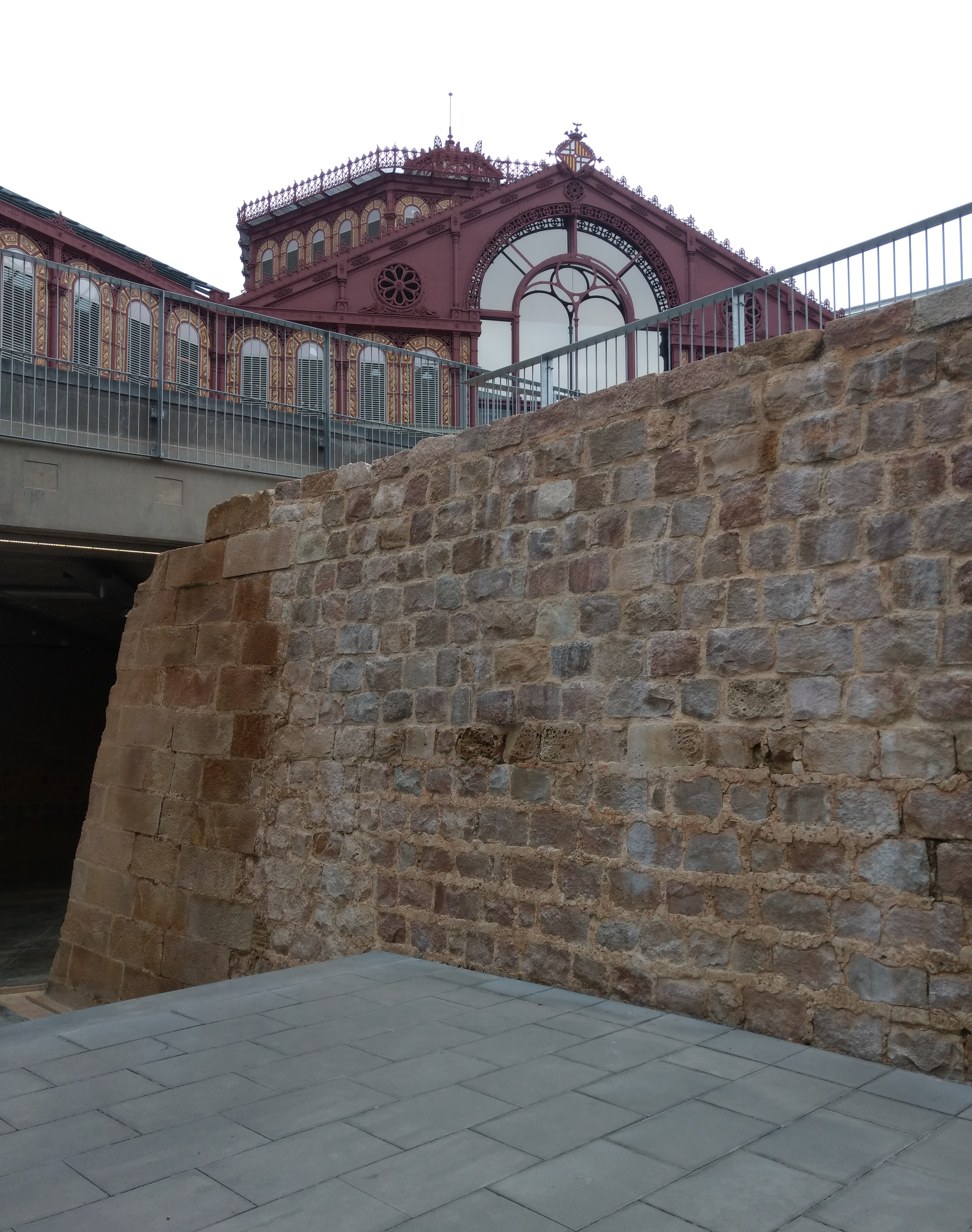 Tramo del Baluard de Sant Antoni expuesto en el Mercat de Sant Antoni. Área abierta al público.